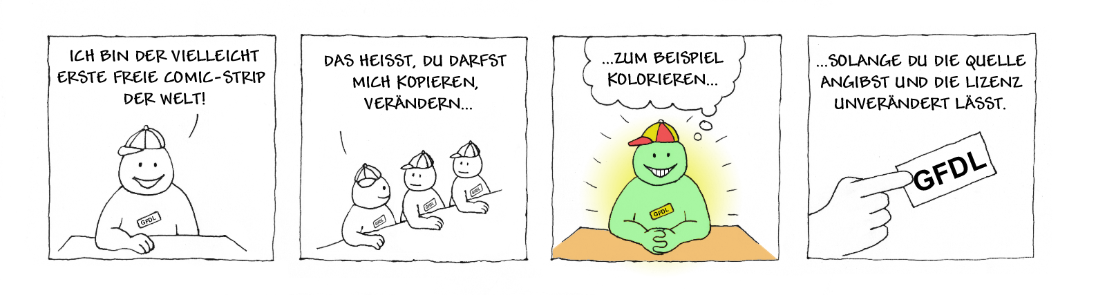 Beispiel für einen Comic-Strip